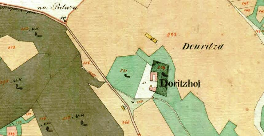 Franciscejski kataster za Kranjsko, 1823-1869